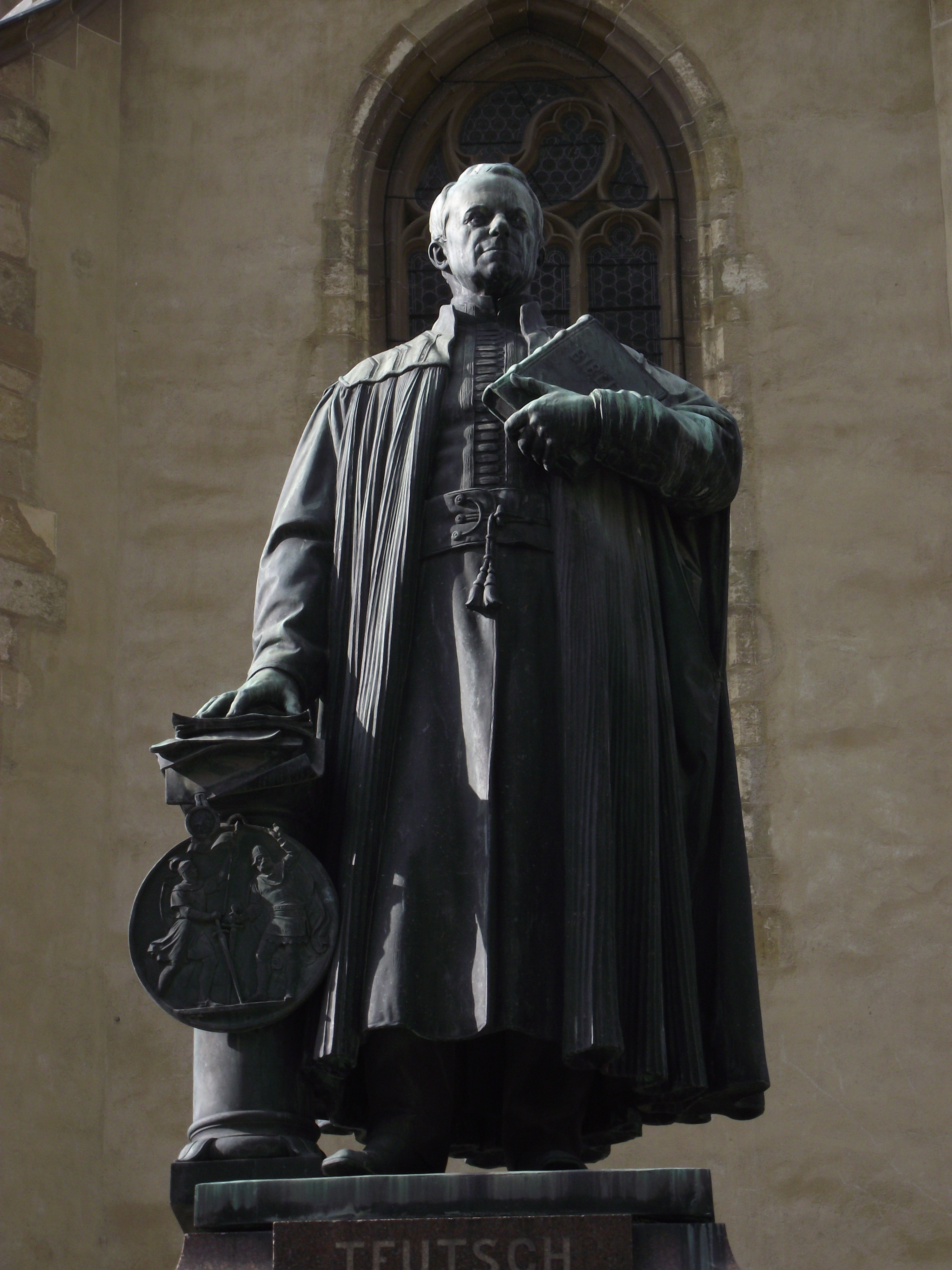 Le monument de Georg Daniel Teutsch de Sibiu